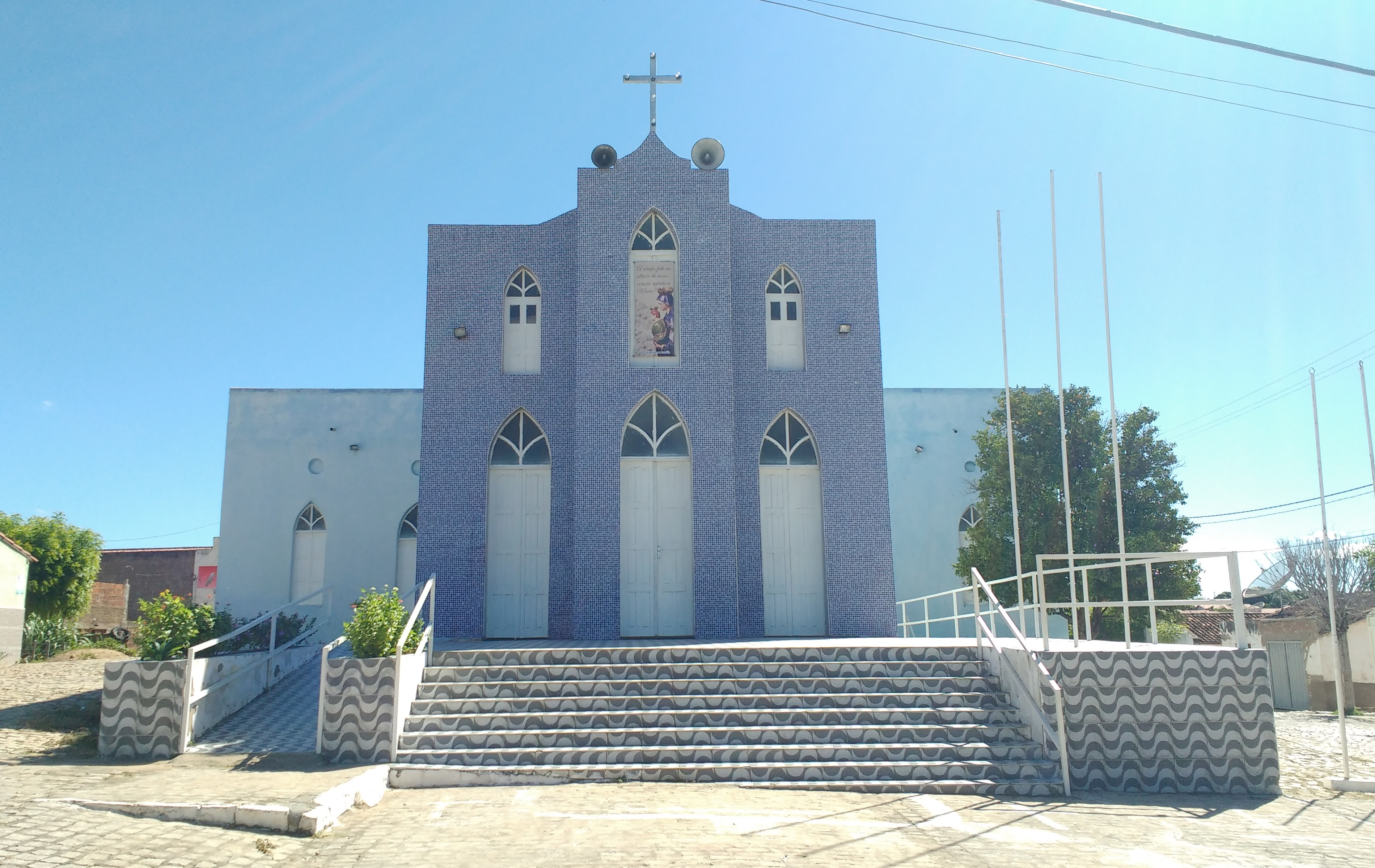 Capela de Nossa Senhora do Perpétuo Socorro, da paróquia de Luís Gomes, em Paraná, Rio Grande do Norte (Brasil).